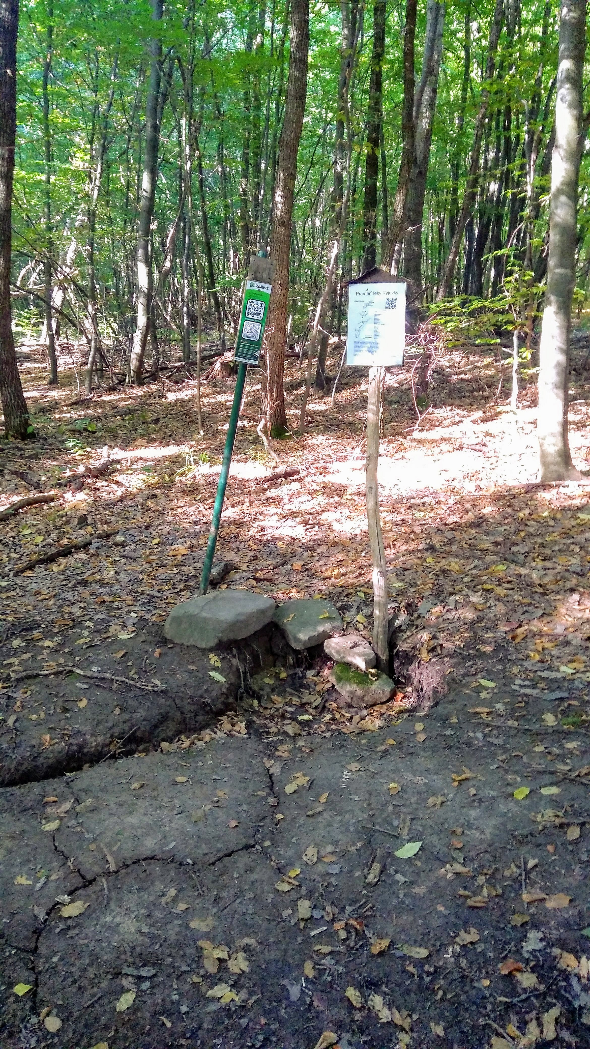 Chvalnov-Lísky, okres Kroměříž. Chřiby, pramen Kyjovky, k.ú. Chvalnov.